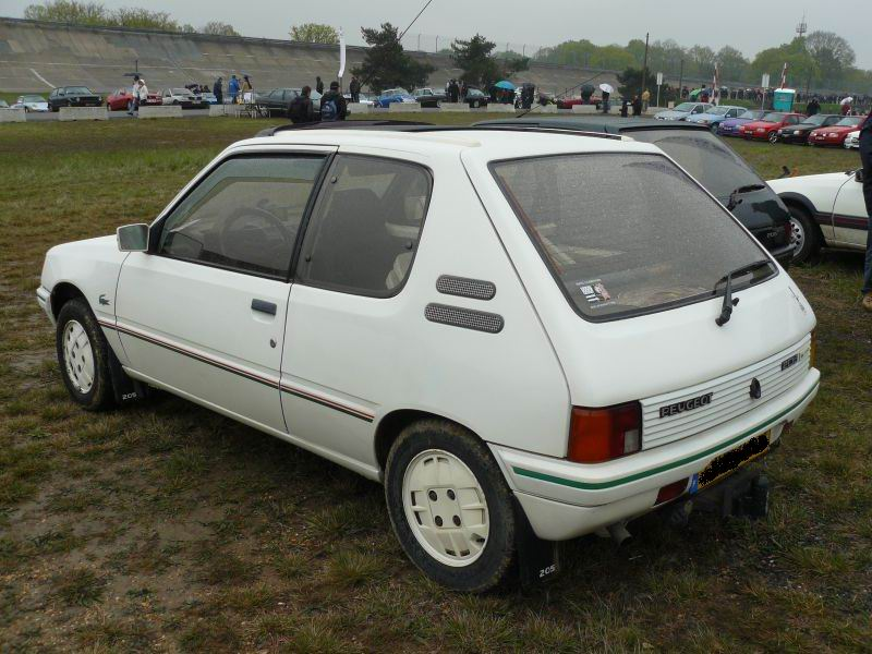 Photo prise à Montlhery avril 2012